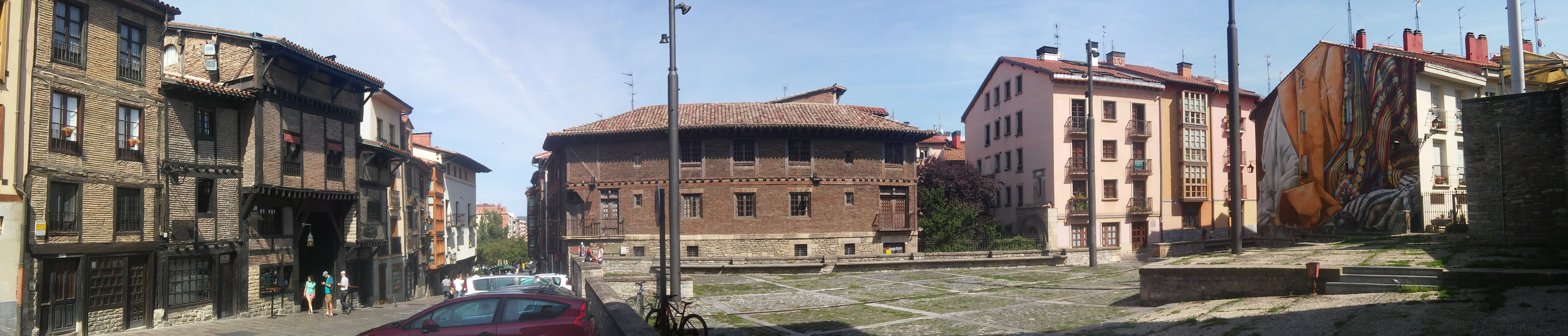 Gasteizko Buruileria plaza, ezkerrean portalea eta erdian Gobeu-Gebara jauregia